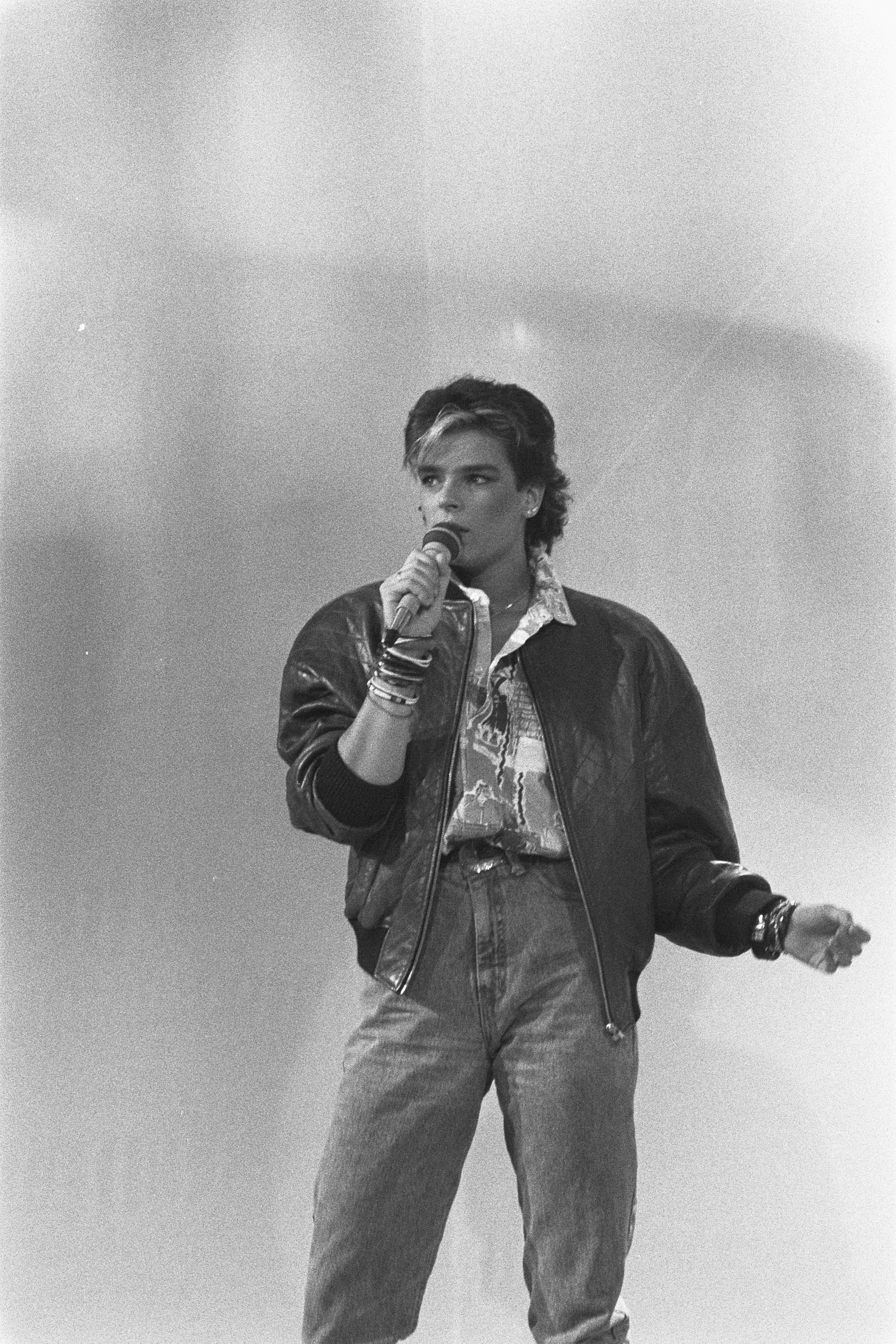 Collectie / Archief : Fotocollectie Anefo Reportage / Serie : [ onbekend ] Beschrijving : Opdracht Haagse Courant; Prinses Stephanie van Monaco tijdens opnamen video-clip Datum : 12 november 1986 Locatie : Monaco Trefwoorden : prinsessen Persoonsnaam : Stephanie Fotograaf : Gerrits, Roland / Anefo Auteursrechthebbende : Nationaal Archief Materiaalsoort : Negatief (zwart/wit) Nummer archiefinventaris : bekijk toegang 2.24.01.05 Bestanddeelnummer : 933-8125